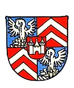 Wappen Graf von (Comte de) Pourtalès (von Neuenburg)